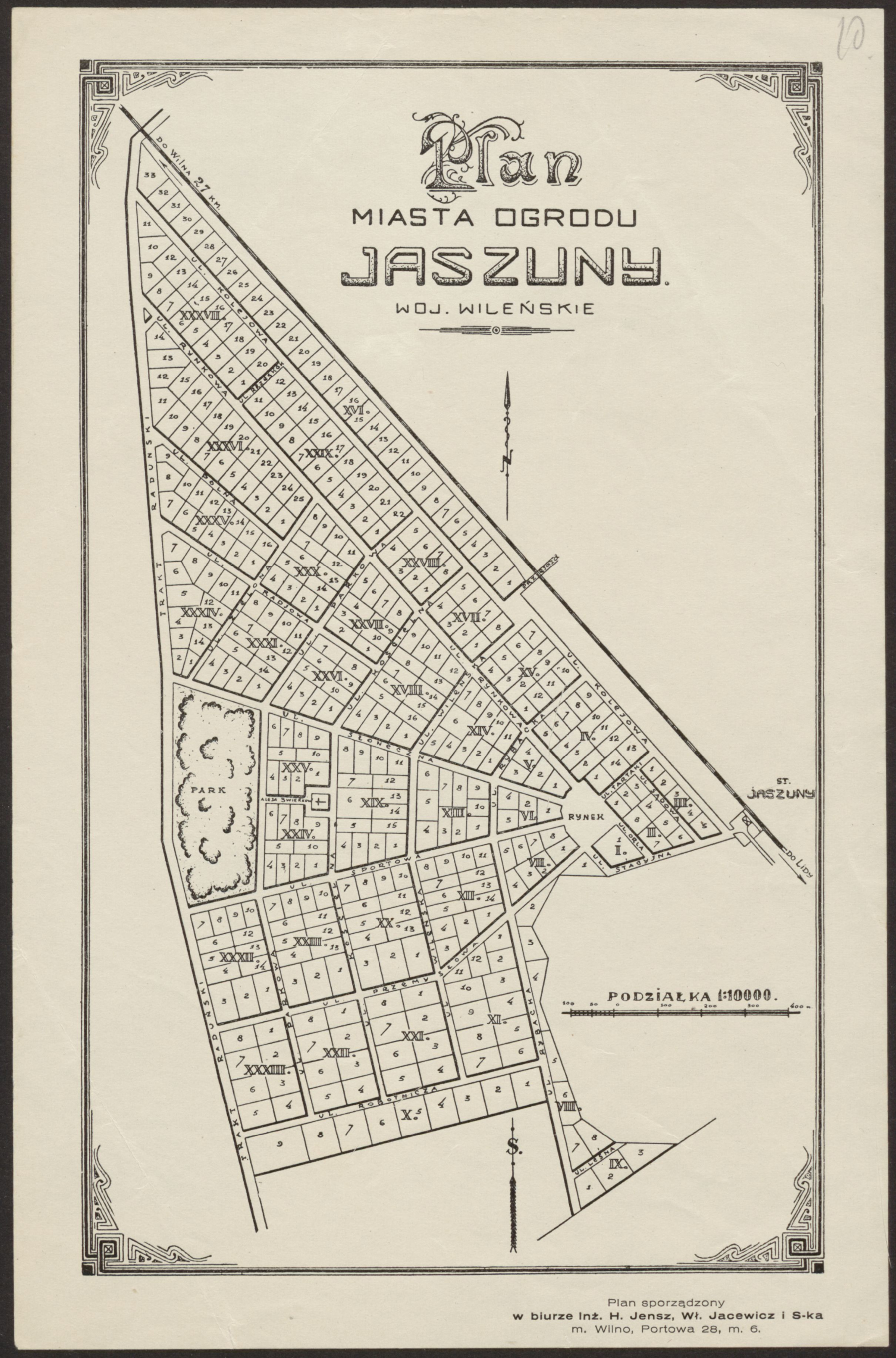 Беларуская (тарашкевіца): Яшуны (Jašuny). Плян